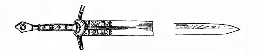 Полутораручный меч императора Максимилиана I. Итальянский клинок длиной 92 см, относящийся к XIV в., позднее украшен изображением герба (стропило в поле щита), выполненным в технике позолоты; рукоять из рога, с позолоченными оковками и щитком, обитым листовым металлом; кожаные ножны венгерского типа, с позолоченным прибором. По музейным данным датируется 1512-1541 гг.